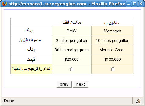 نمونه ای از «مجموعه انتخاب» (یک مثال از سناریو)